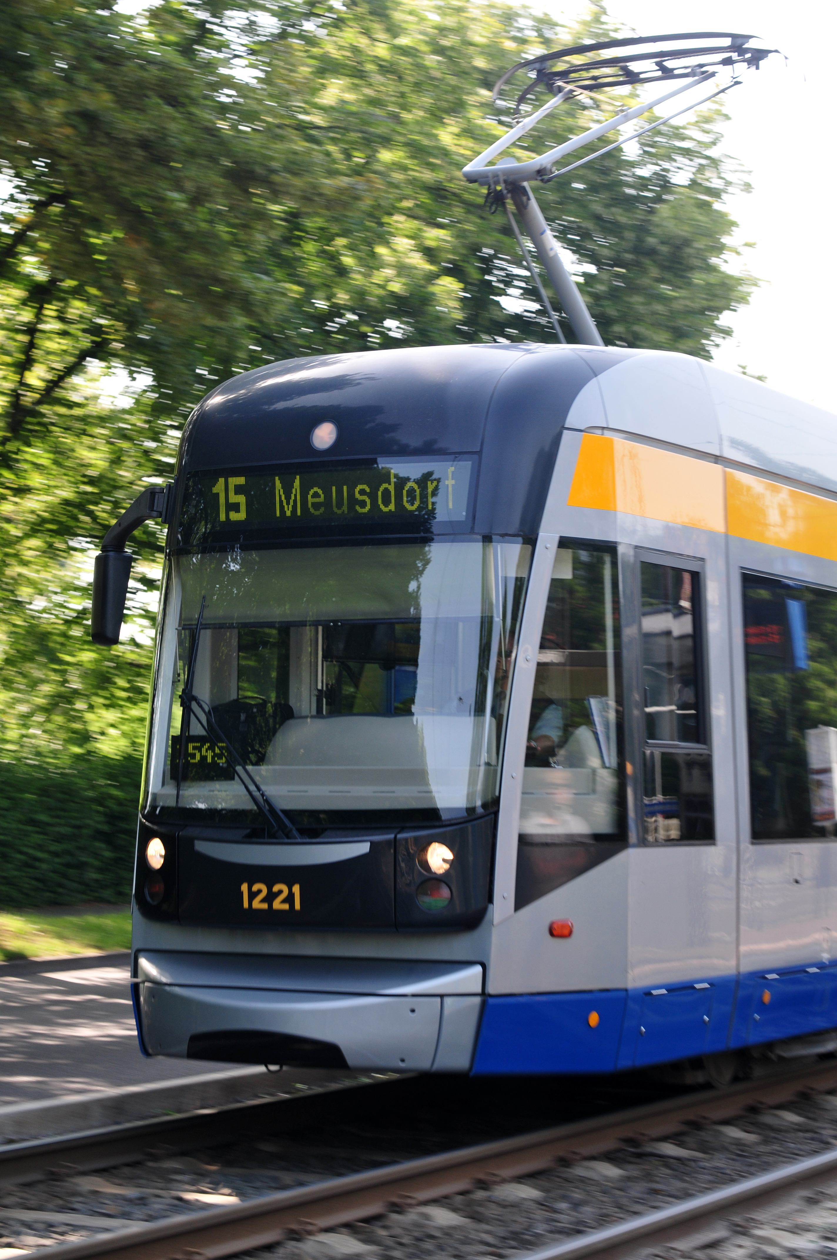 Leipzig, Deutschland